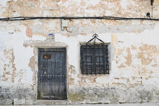 Se puede observar el escudo de la inquisición sobre el dintel de la puerta.